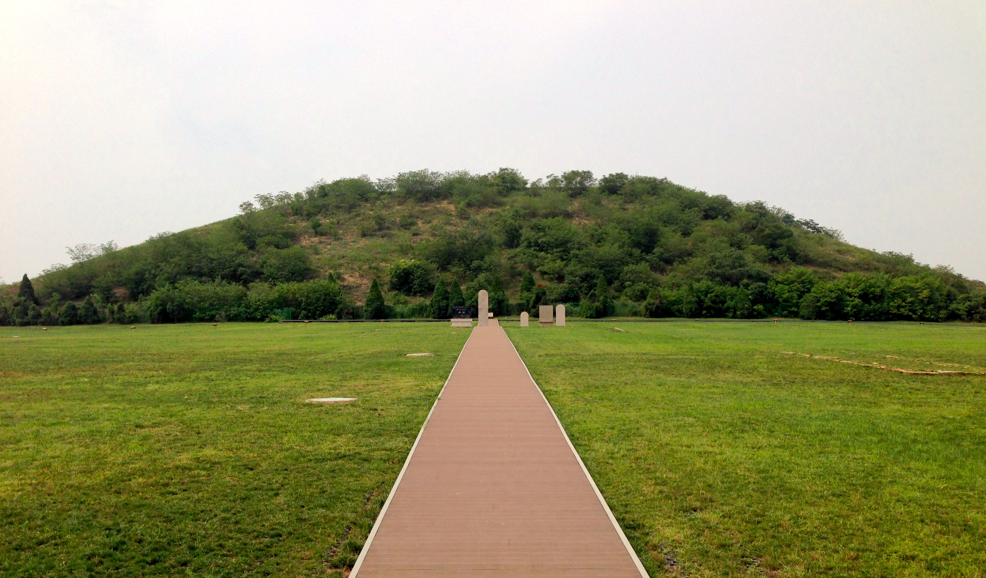 Kejsare Jingdis gravpyramid i Han Yangling sedd söder ifrån